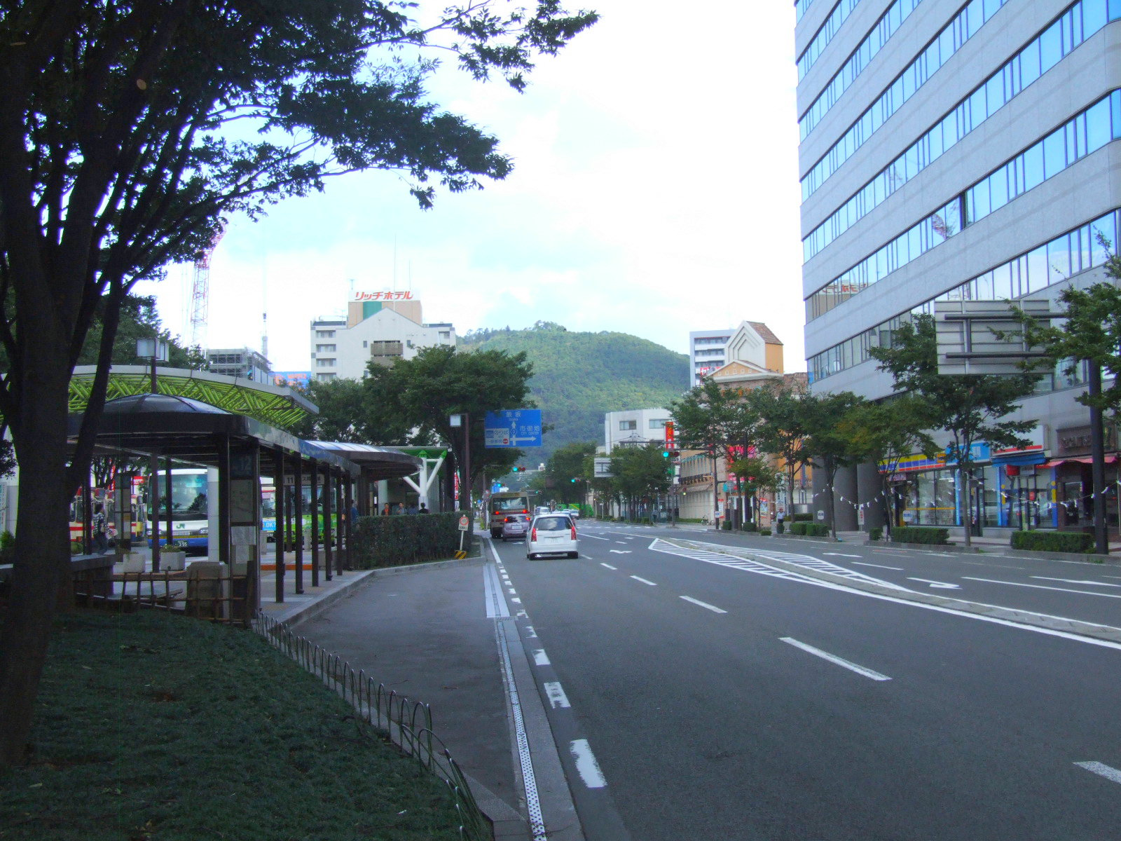 Fukushima Prefectural road 3, Fukushima-Izaka Line. Fukushima, Fukushima prefecture, Japan.